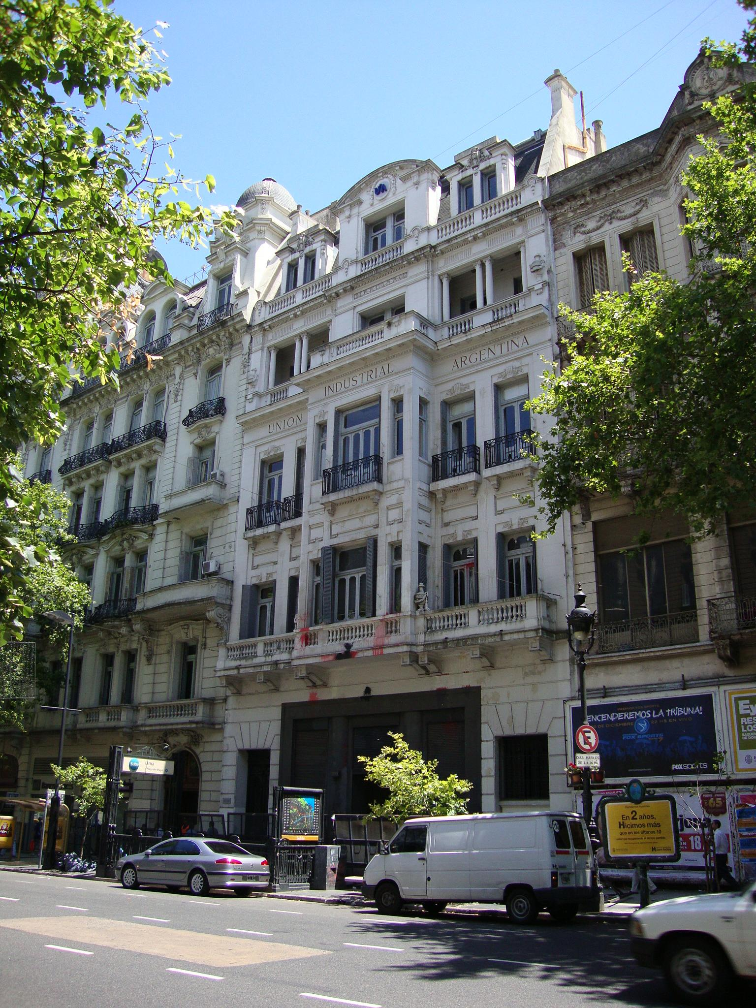 Edificio ocupado por la Unión Industrial Argentina. Avenida de Mayo nº 1147/57. Proyecto por Edwin Merry y construido en 1895.